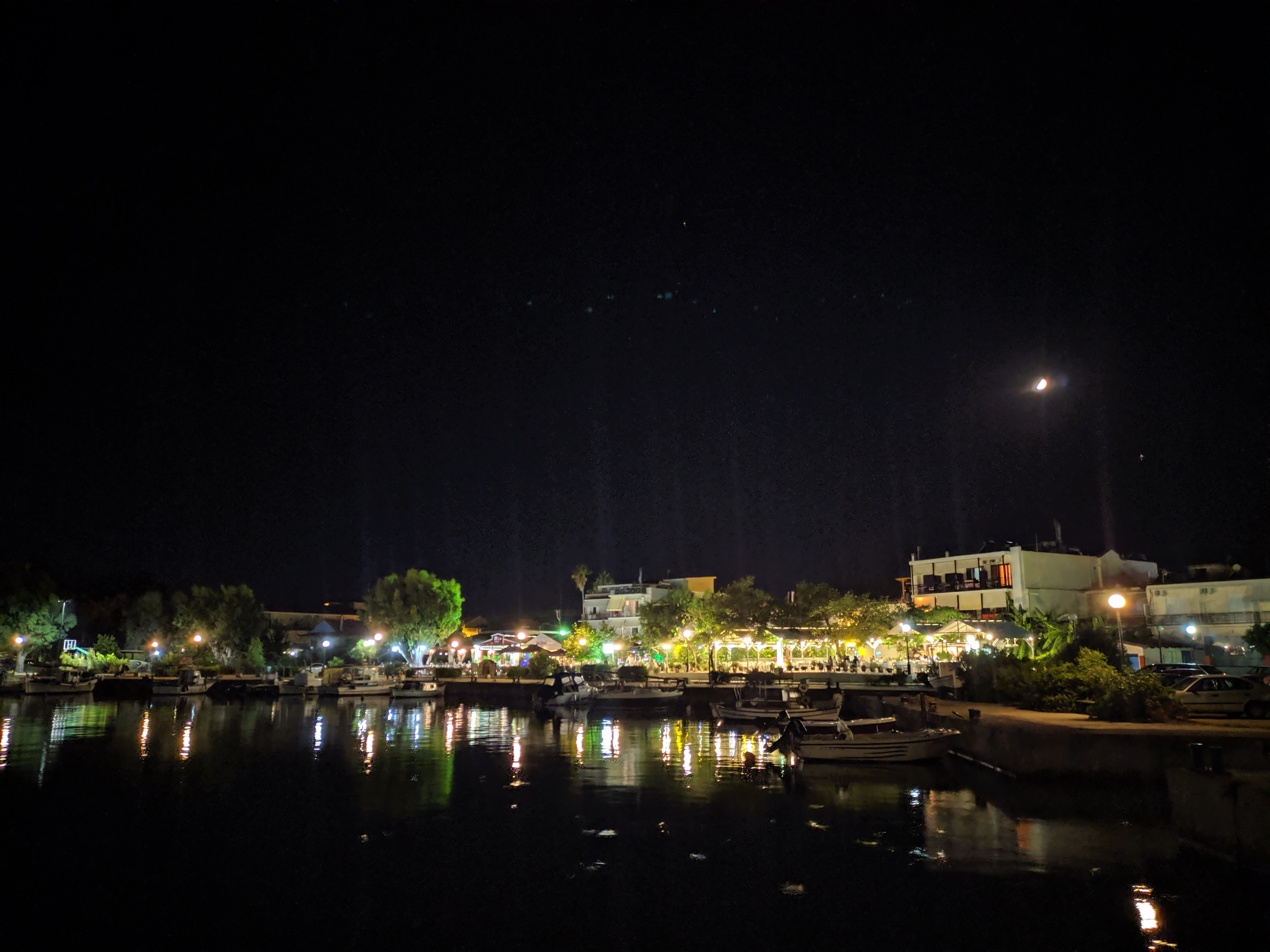 Νυχτερινή λήψη από το μόλο.